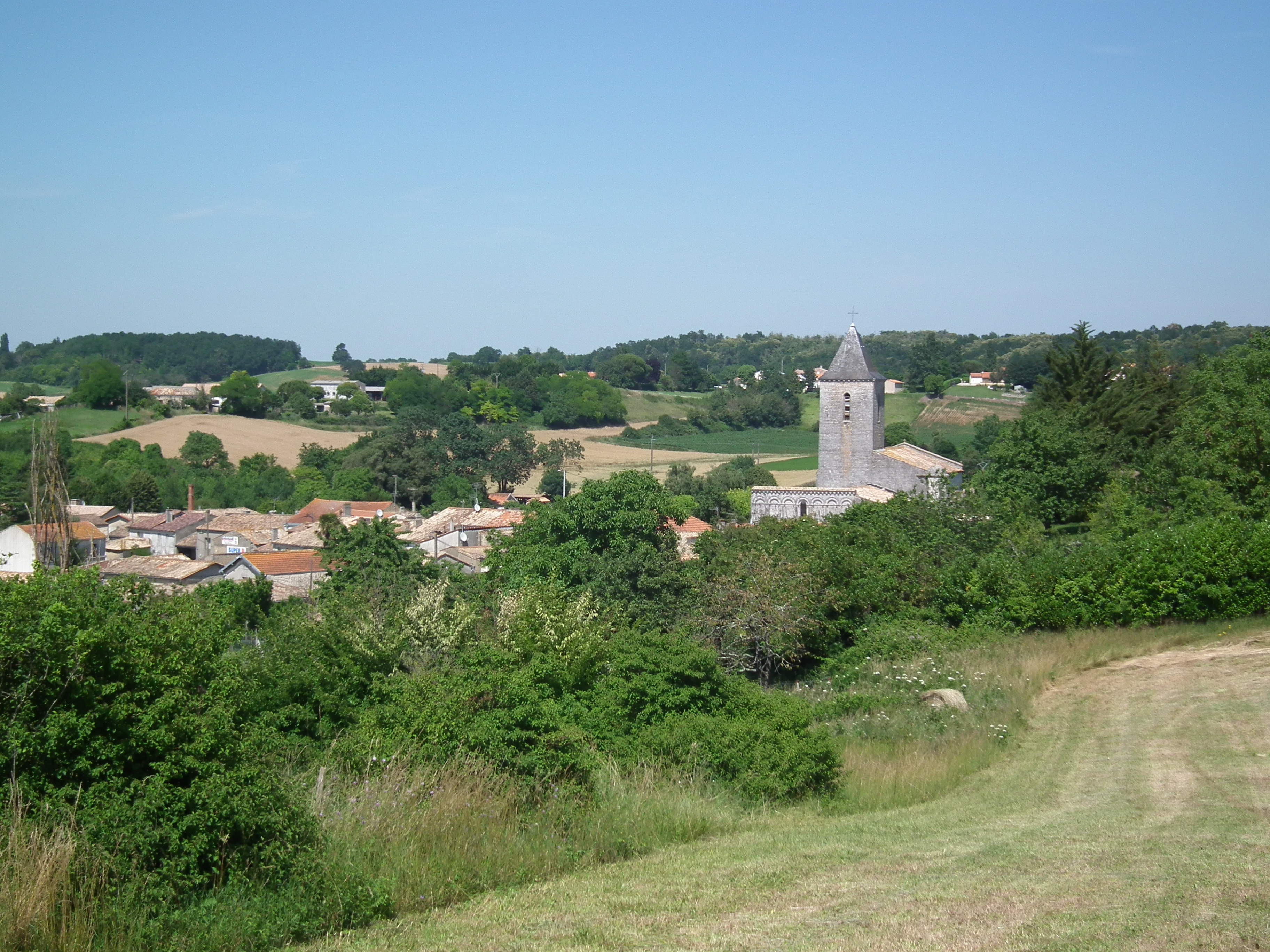 Paysage près de Petit-Niort (commune de Mirambeau)